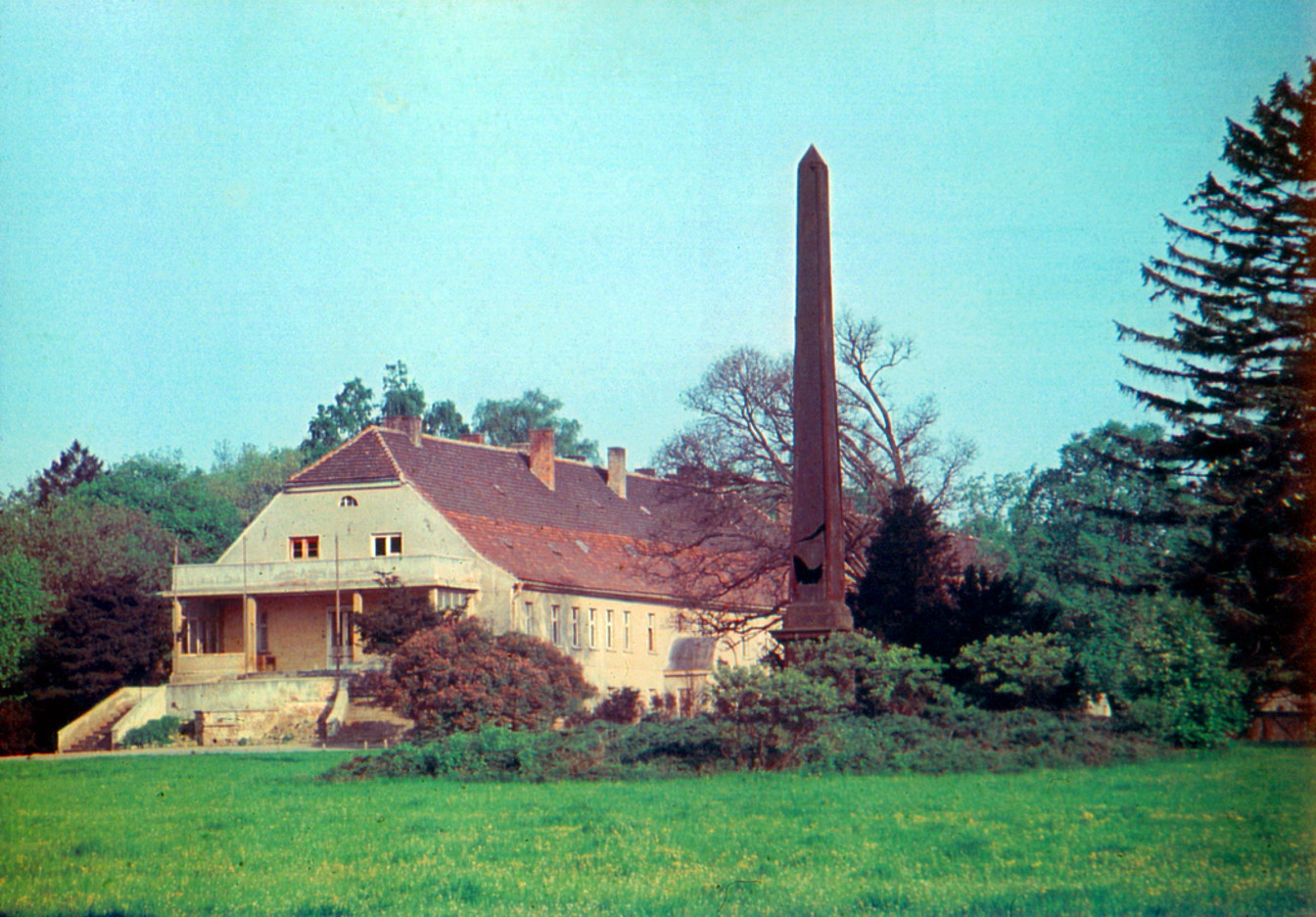 Herrenhaus Degenershausen 1967